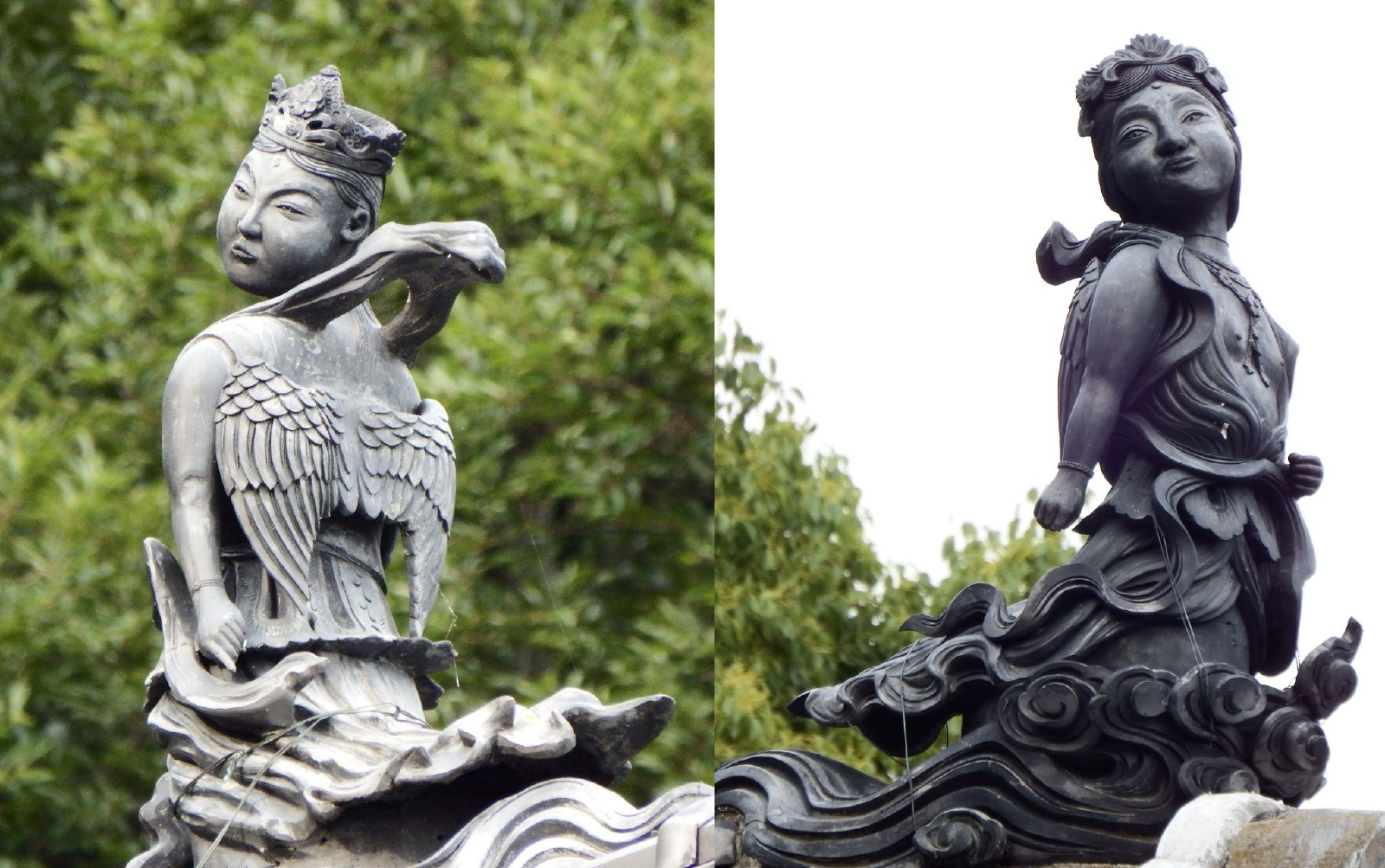 切幡寺の本堂後ろ屋根の前後にいる「極楽の迦陵頻迦」